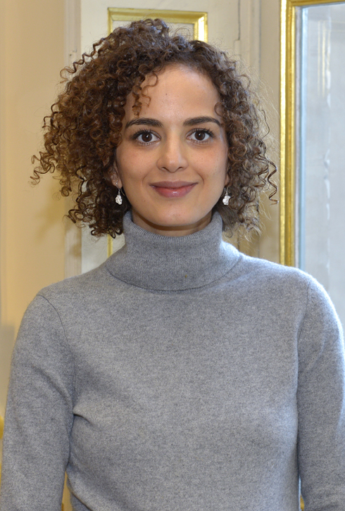 Leïla Slimani lors de la conférence de lancement de la Nuit de la lecture 2017